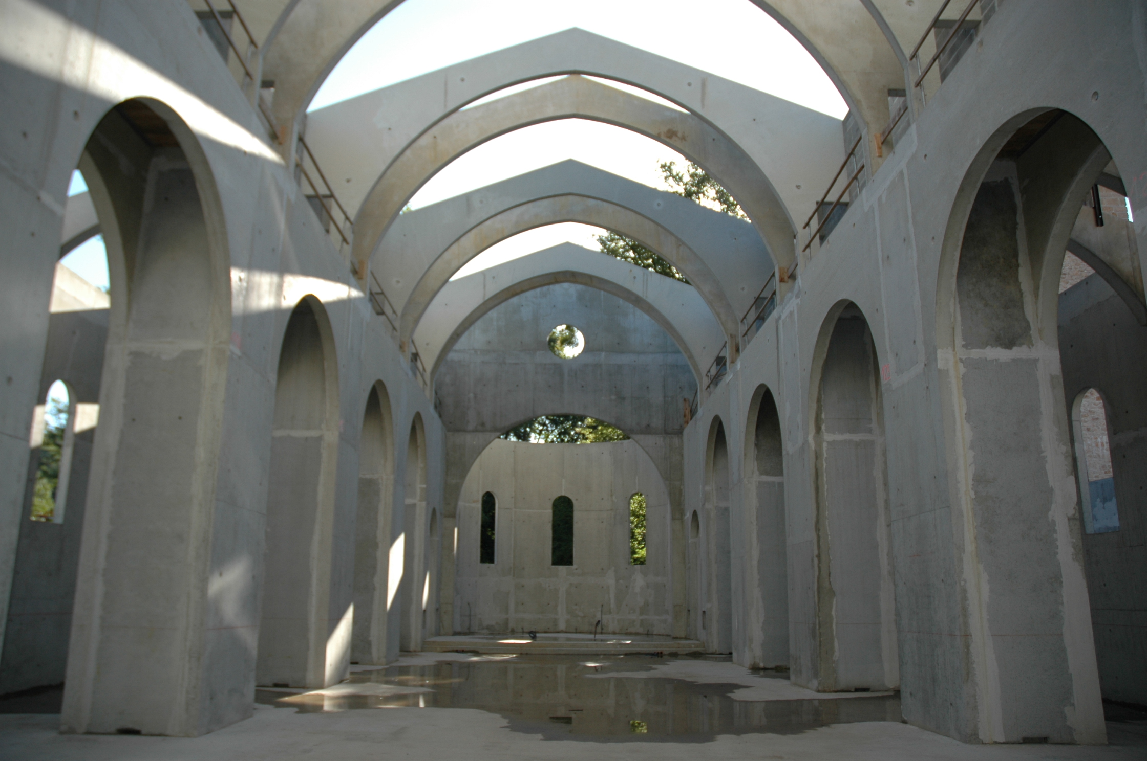 Eglise abbatiale de ND de Pesquié (09)